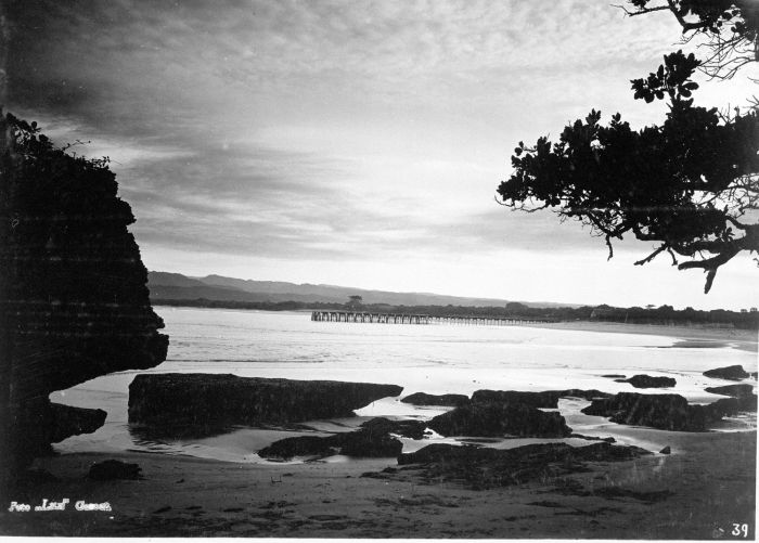 Foto. De baai Pameunkpeuk aan de zuidkust.